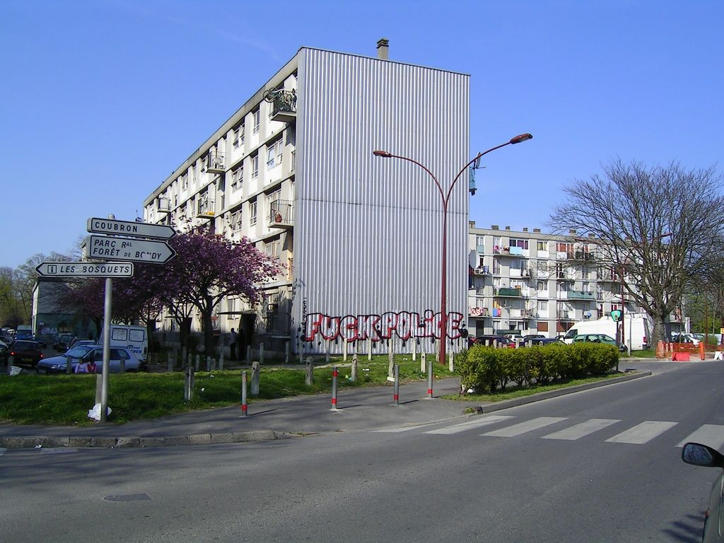 Le quartier des Bosquets à Montfermeil (Seine-Saint-Denis), France Avril 2007 Photo personnelle (own work) de Marianna